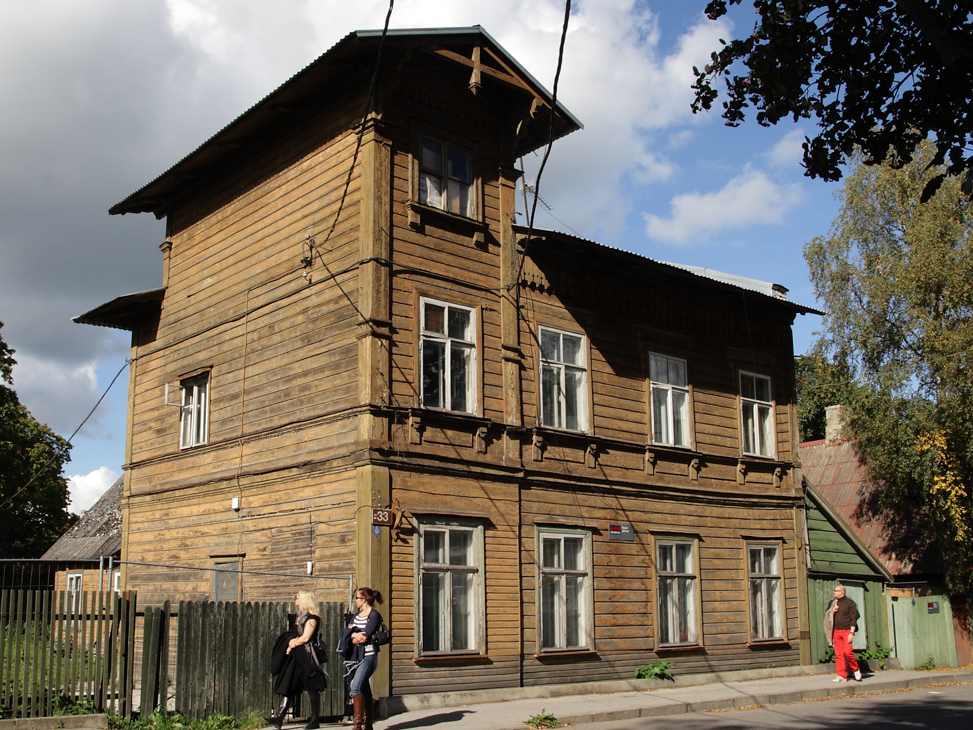 Tallinn, elamu, J. Poska 33